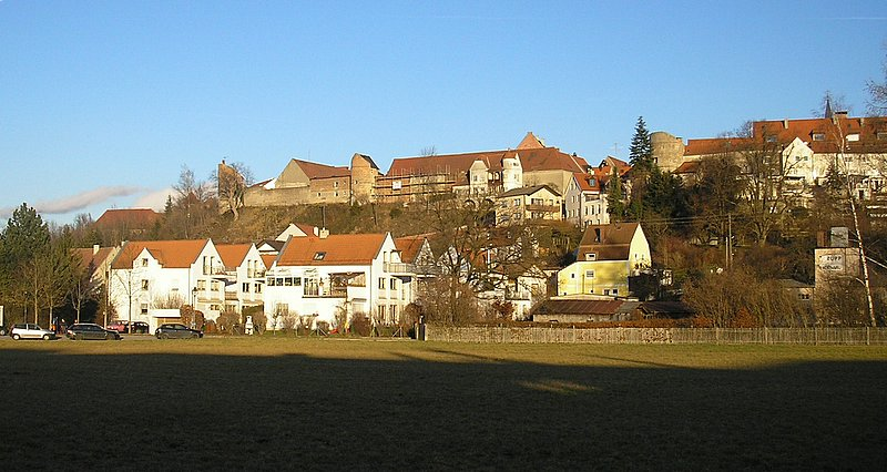 Stadtbefestigung Friedberg (Landkreis Aichach-Friedberg, Bayerisch-Schwaben). Westseite, Nordteil. Eigene Aufnahme, Jan. 2007 / Friedberg City Walls (Bavaria, Germany). View from the west, northern part. Own photo, Jan. 2007